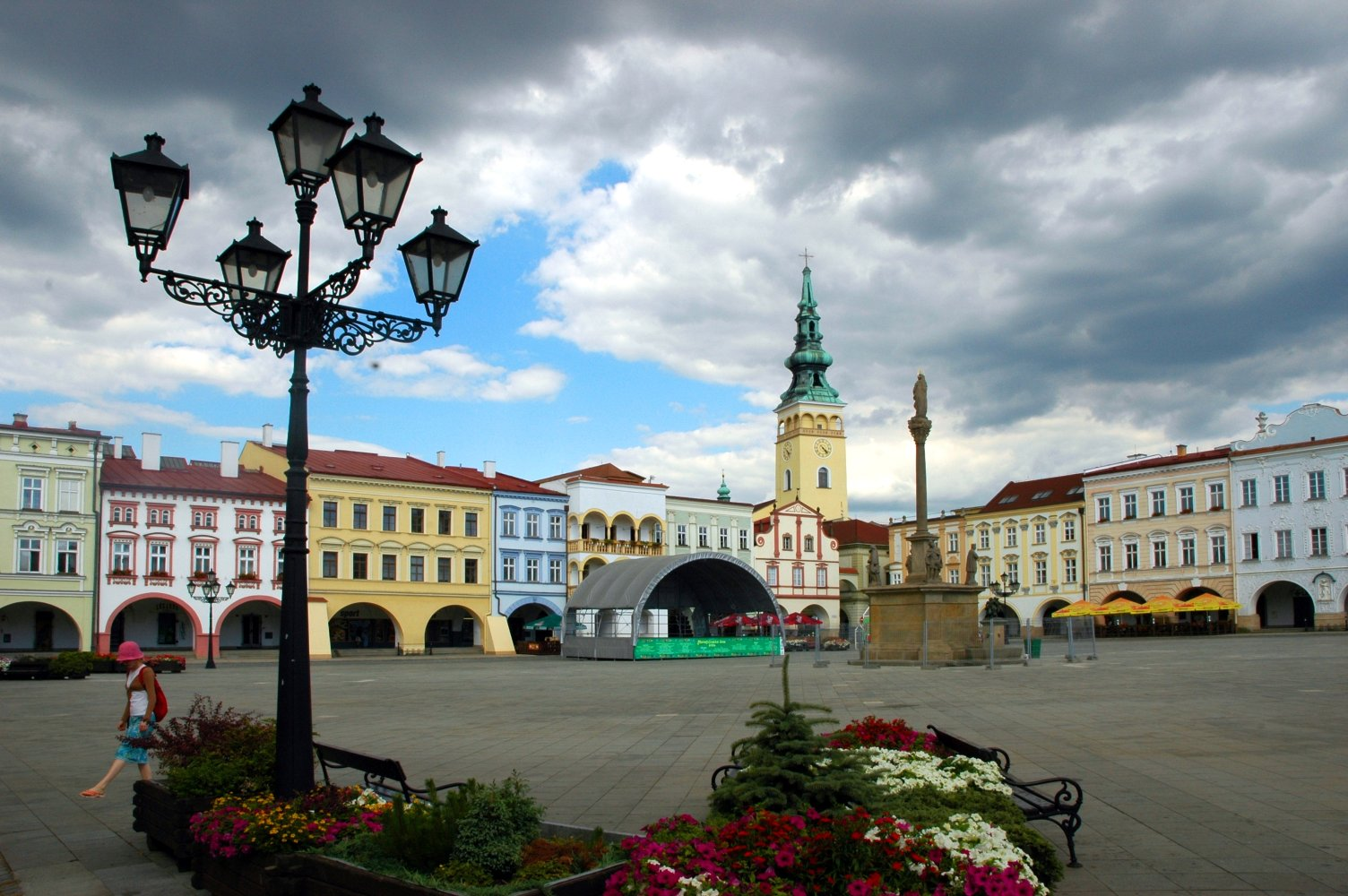 Nový Jičín, central square, Czech Republic